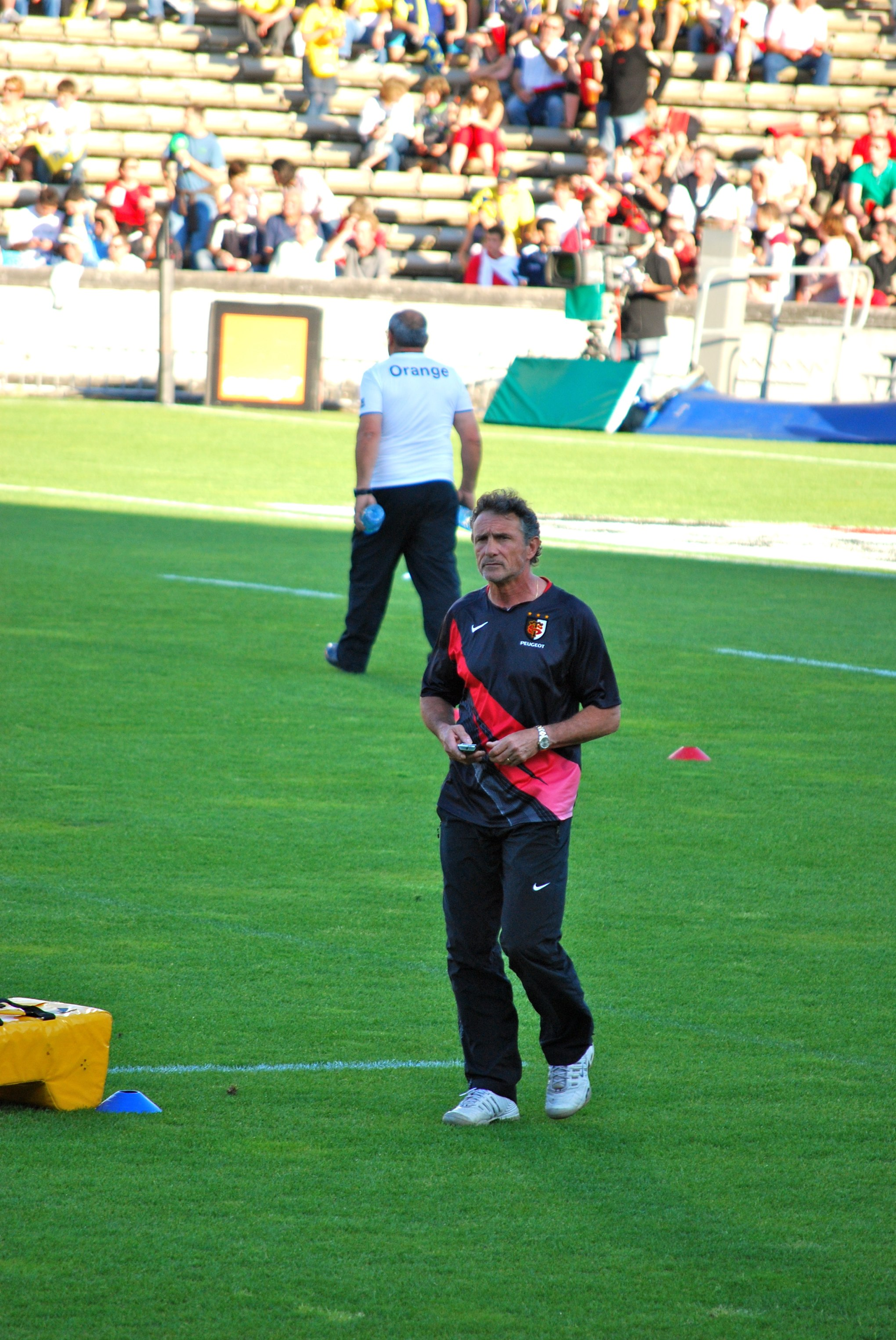 Guy Novès, lors de la demi-finale du top 14 2008-2009 opposant Toulouse à Clermont